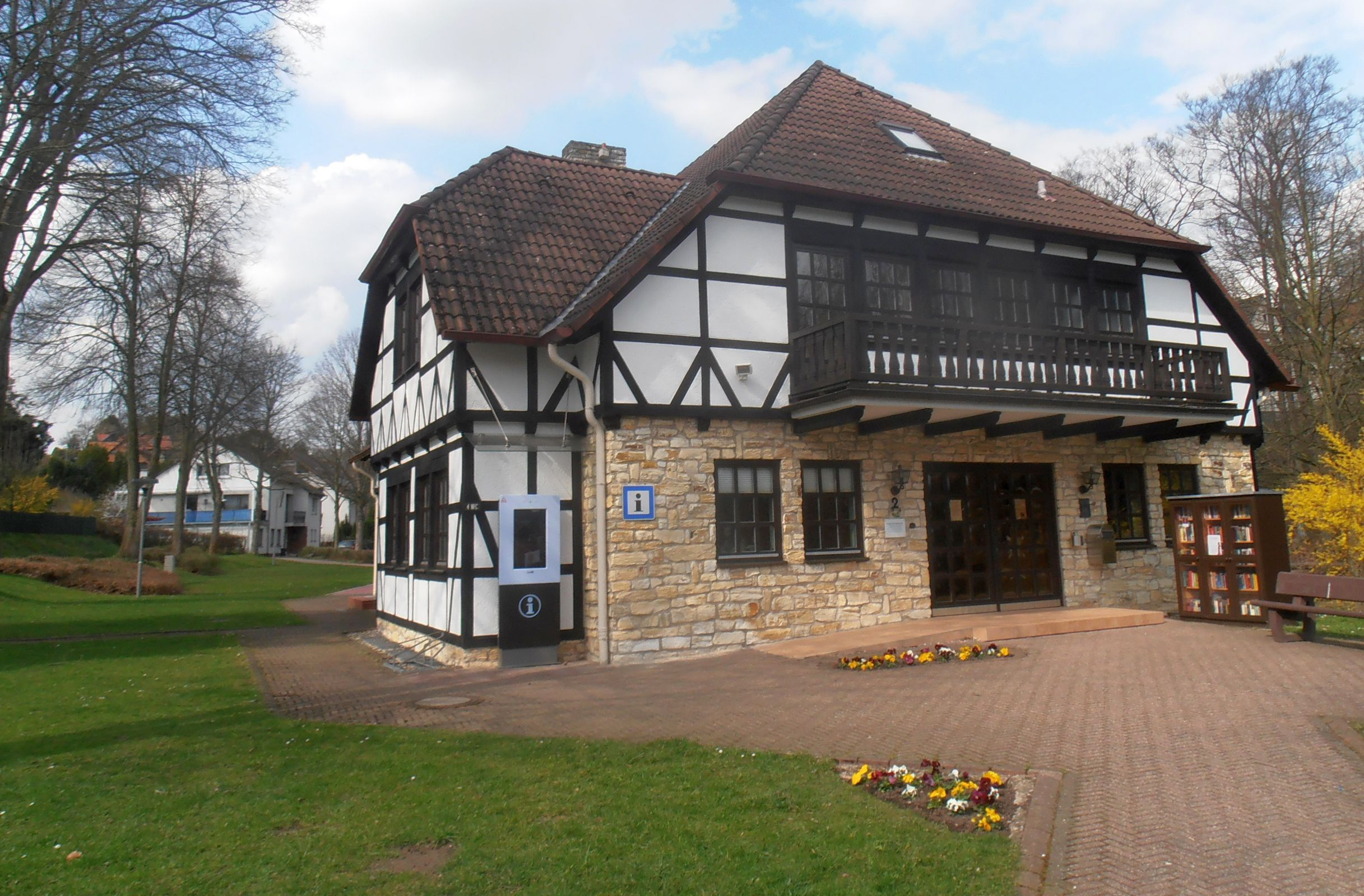 Erich-Mäder-Glasmuseum in Delligsen-Grünenplan, Blick von S